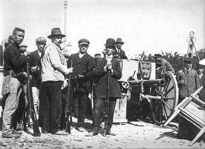 Revoltosos na Rotunda em 5 de Outubro de 1910